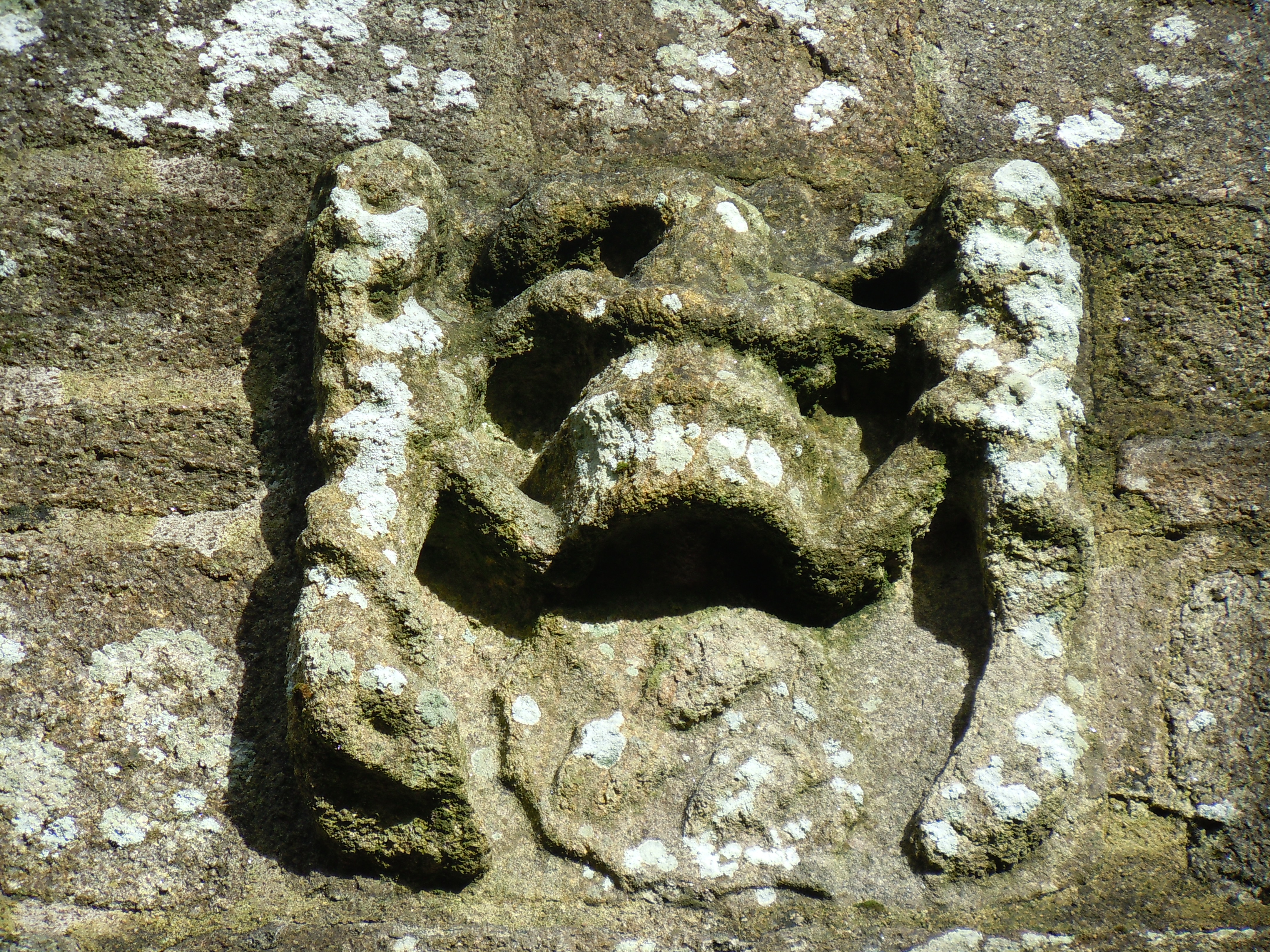 armoiries des Toutenoultre, seigneurs de Penéhoc, visibles sur le pignon ouest de la chapelle Saint Antoine de Guiscriff, juste au dessus du portail (Morbihan)